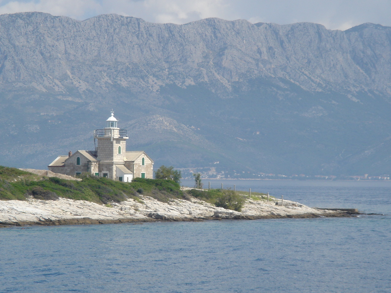 Svetionik Sućuraj